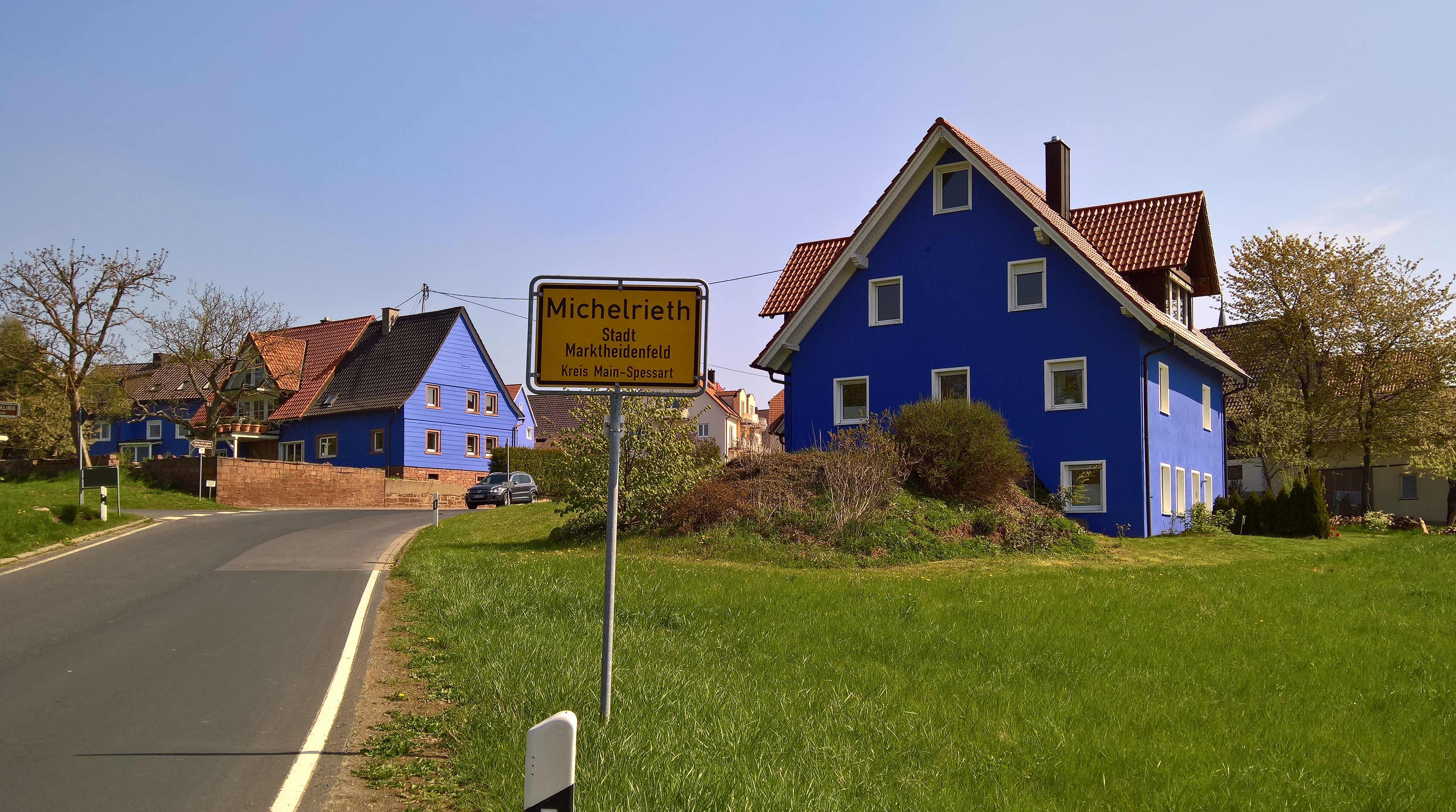 Michelrieth: westlicher Ortseingang